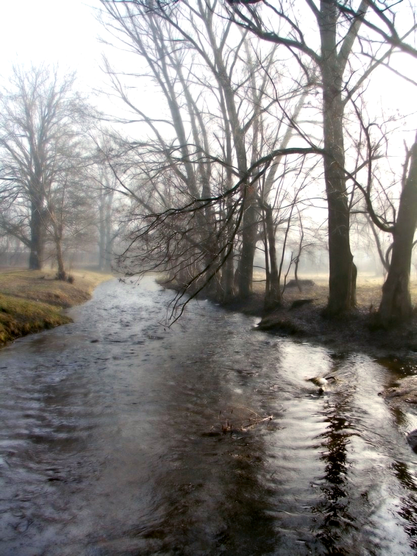 Czarna Hancza river